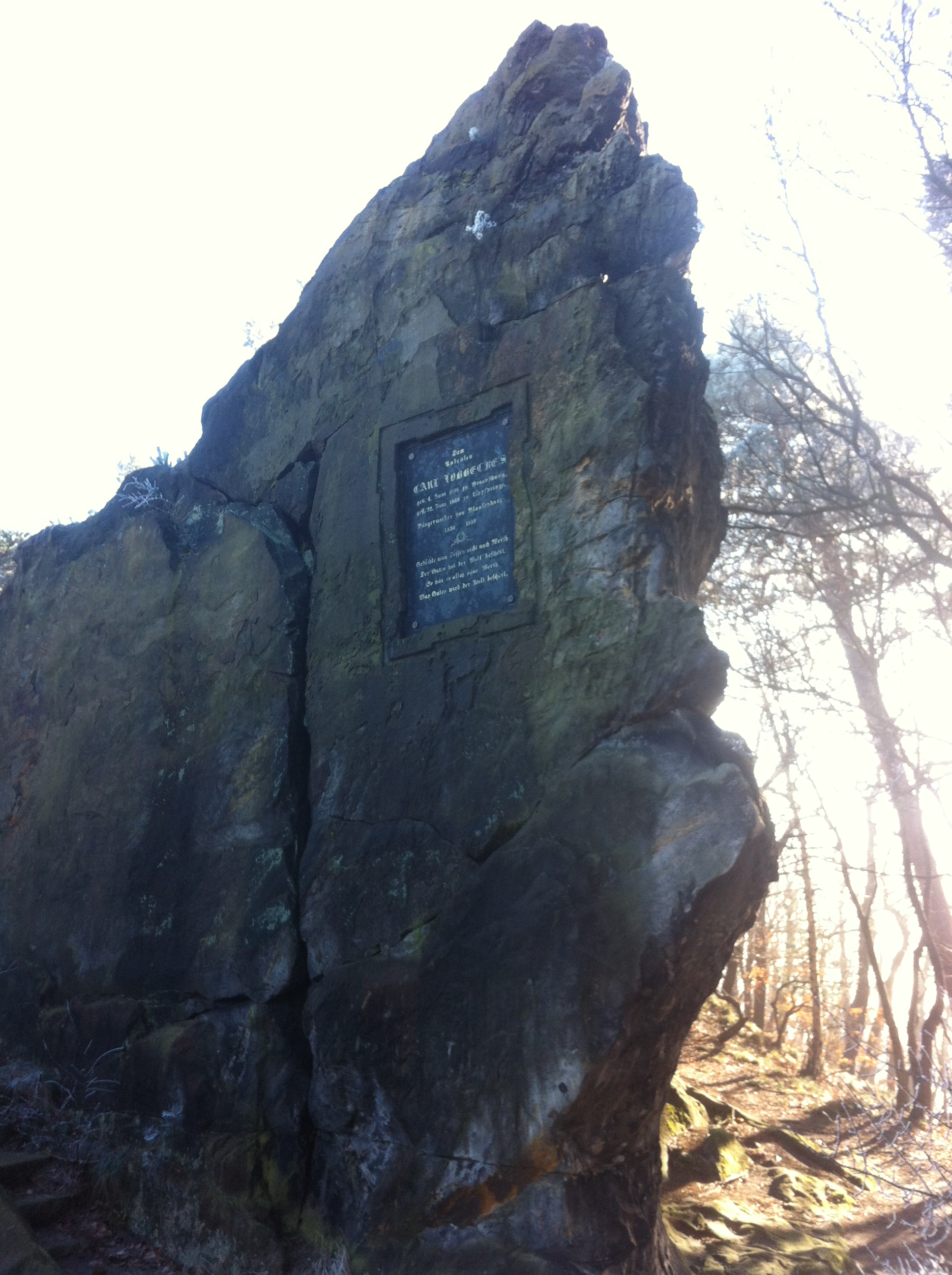 Löbbeckefelsen